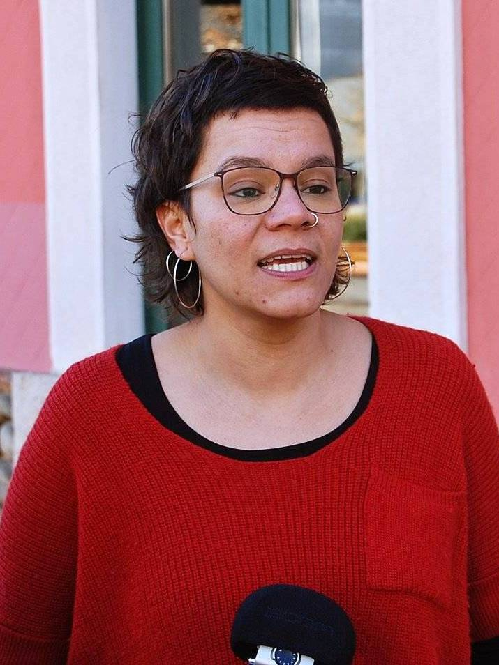 “A les comarques gironines som el vot útil de la gent d’esquerres que vol canviar les coses”. La cap de llista ha recordat que la CUP es juga els darrers escons amb PP i C’s i que és “garantia per fer front al bloc del 155”